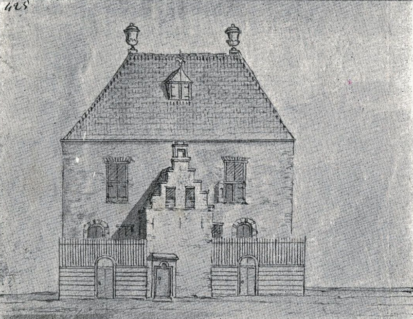 reproductie omstreeks 1907 van een prent uit 1694 "De Mennisten Vermaning in Workum"